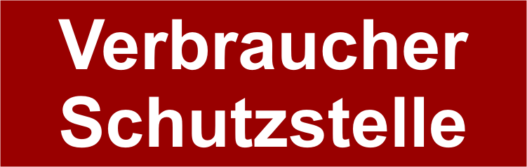 Logo der Verbraucherschutzstelle e.V. (gemeinnütziger Verbraucherveband)